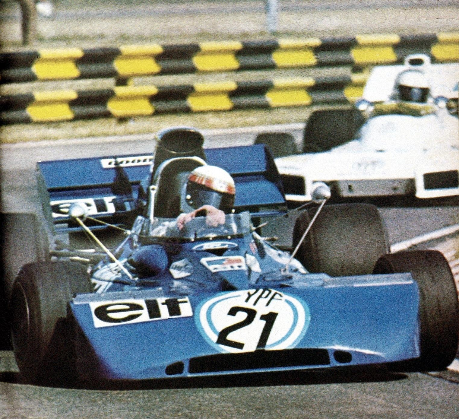 Jackie Stewart - El Gráfico del 25 de Enero de 1972 - 2729.